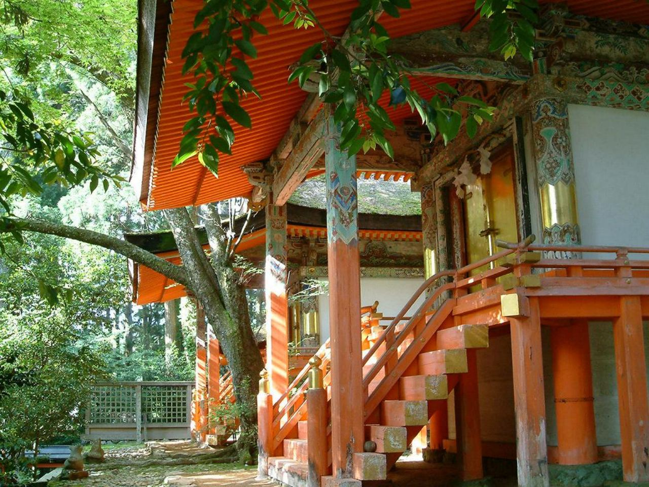 高野山 御社